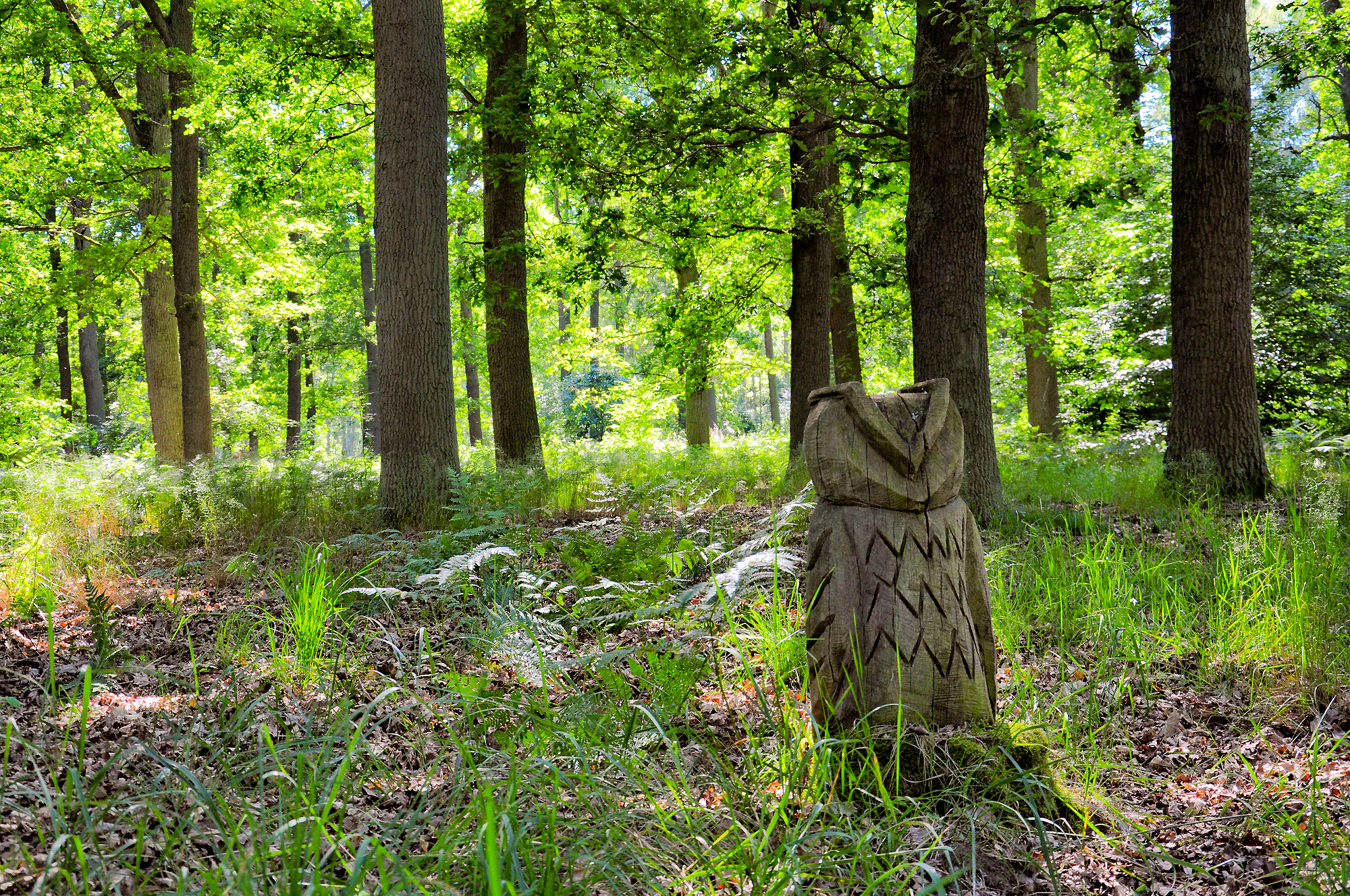 Naturschutzgebiet Kienhorst/Köllnseen/Eichheide: Holzeule im südlichen Teil des Naturschutzgebietes am Wegesrand.